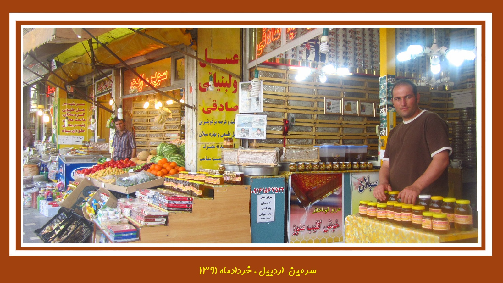 Sareyn Ardabil-سرعین اردبیل